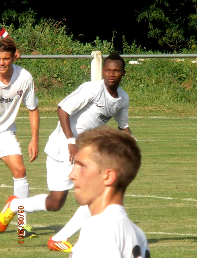 Désiré Sègbè Azankpo est né le 6 Mai 1993 au Bénin. Du haut de ses 21 ans, il est international béninois depuis le 17 Mai 2014. Ses prouesses techniques, ses conduites de balle, sa puissant athlétique, sa lourde frappe, sa pointe de vitesse phénoménale et ses passements de jambes hors pairs ont poussés le sélectionneur des Ecureuils du Bénin a lui confié la pointe de l’attaque de l’équipe nationale du Bénin.